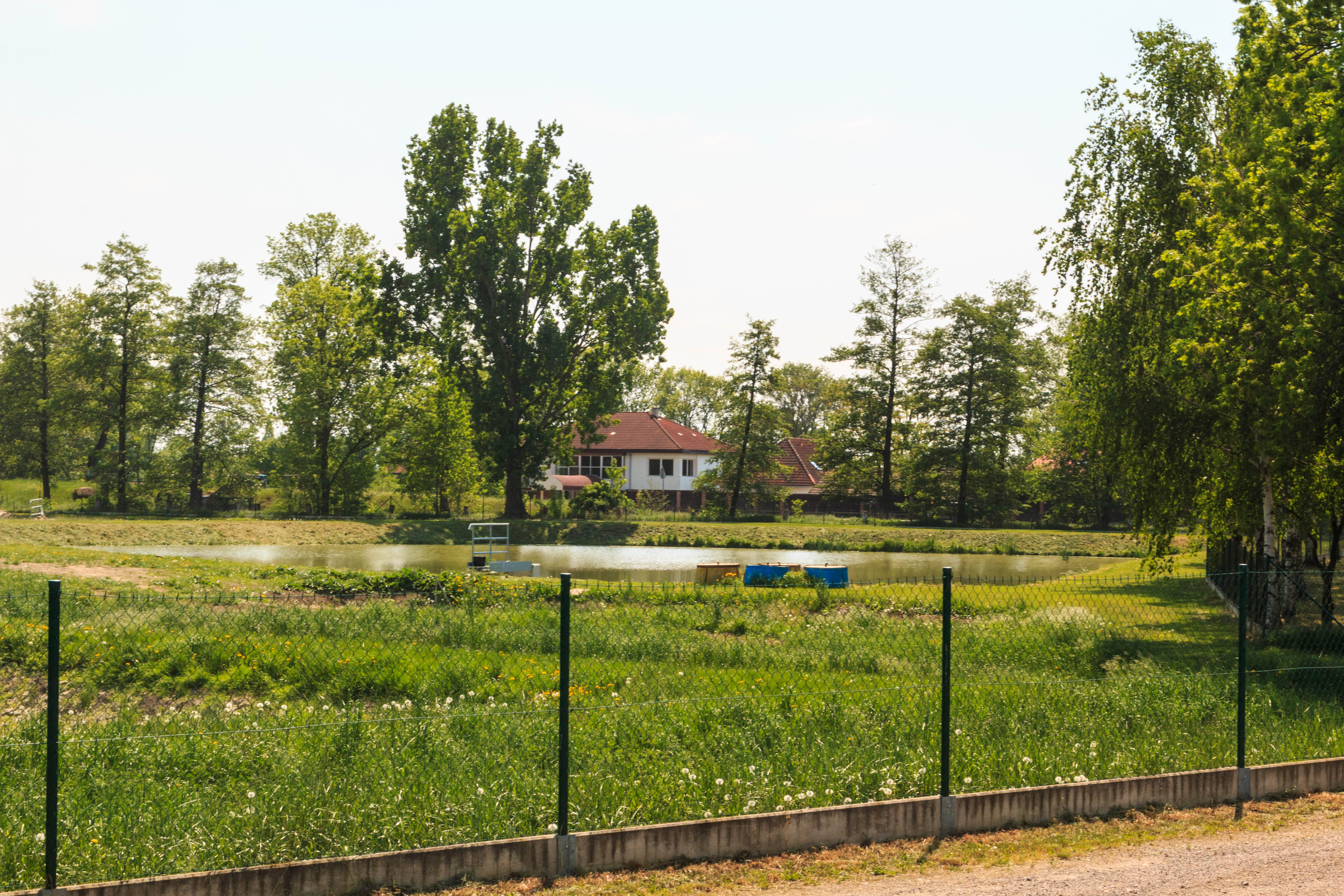 Násadové rybníčky u Dašic Project: Vodstvo